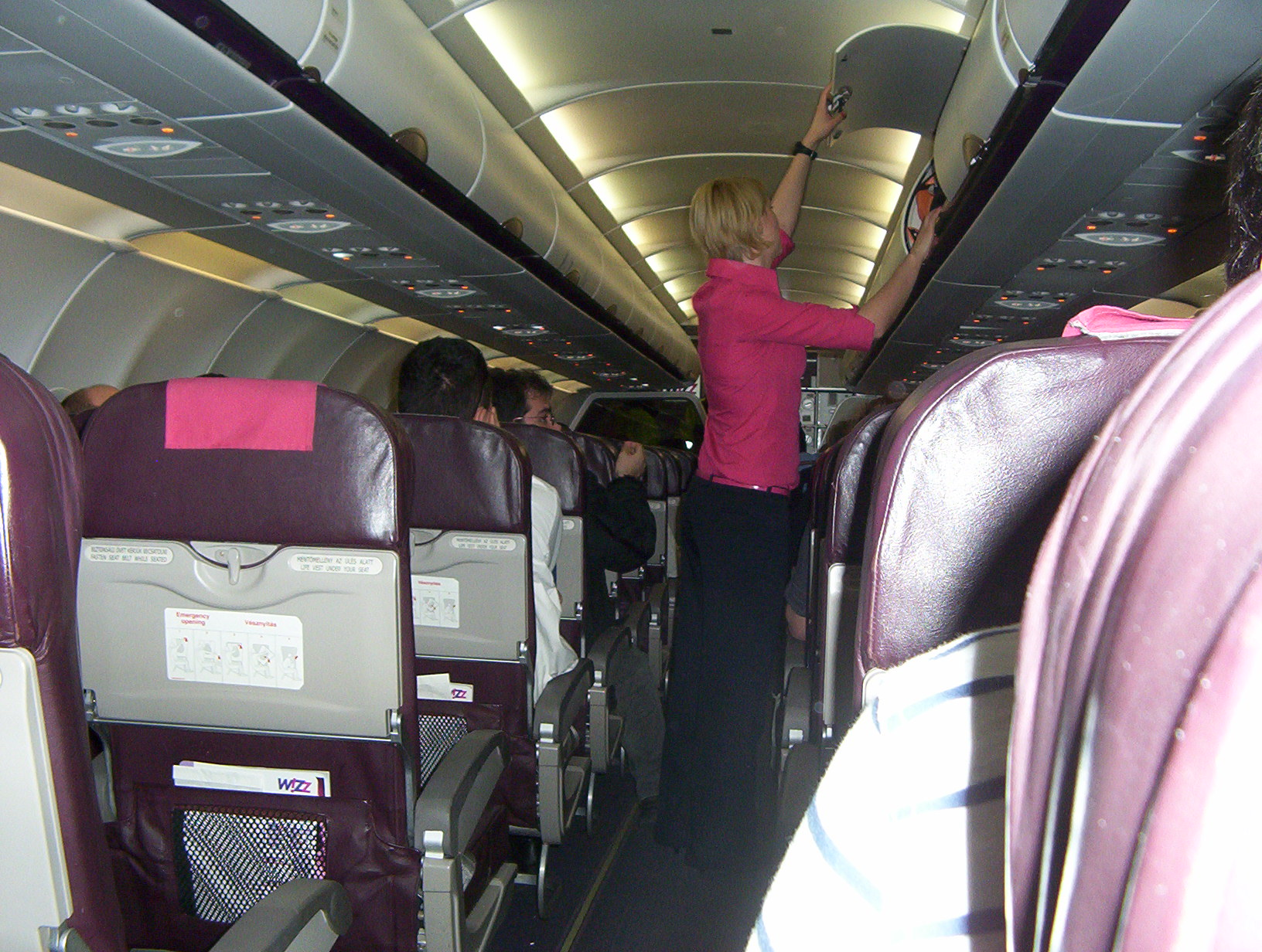 A Wizz Air Airbus A320 típusú repülőgépének fedélzetén, a BUD-LTN W6 209-es járaton.